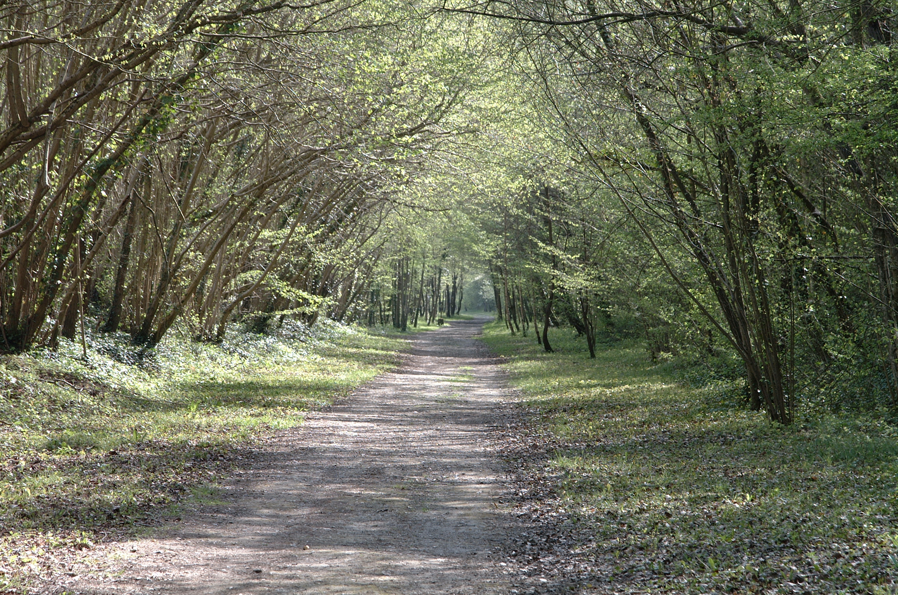 Coulée Verte, aménagée sur l'emprise de l'ancienne Ligne Beauvais - Amiens en Picardie